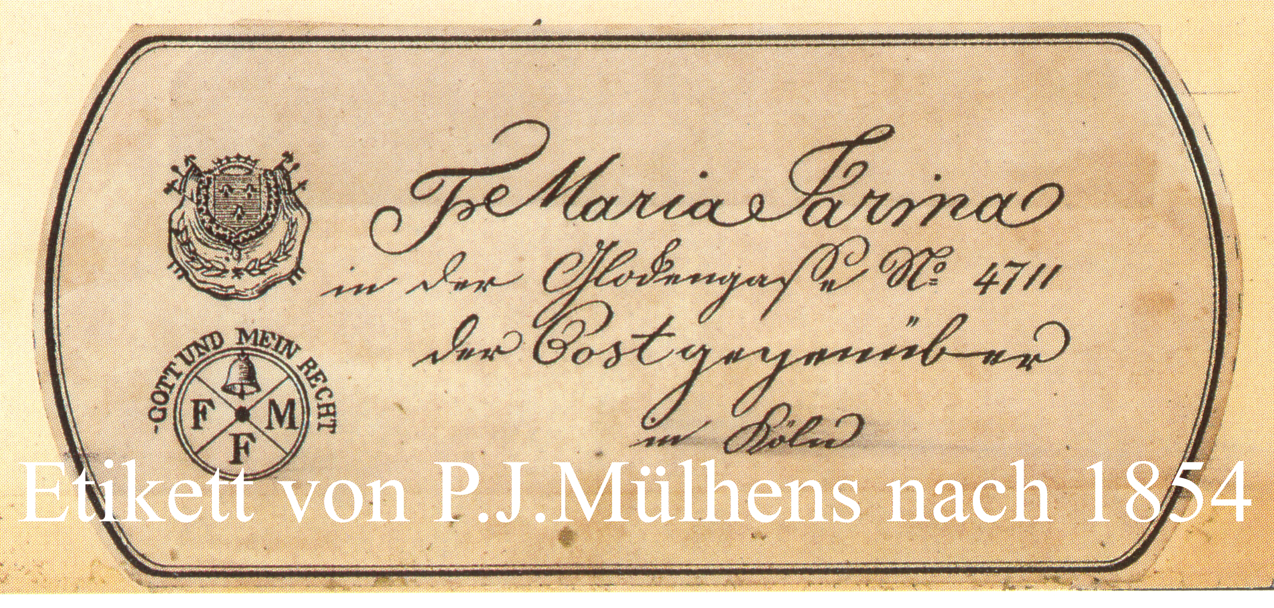 Etikett